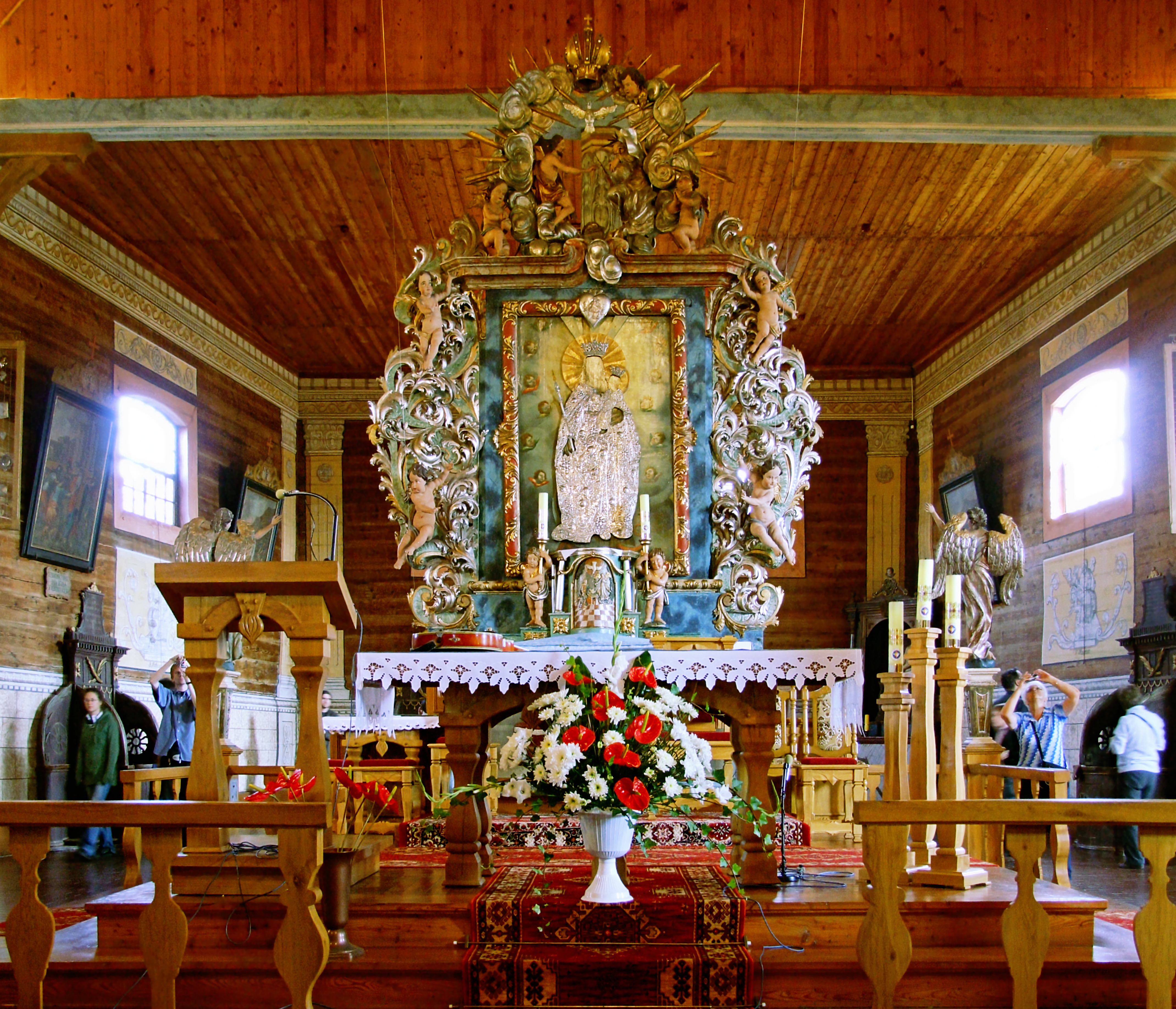 Bralin; kościół Narodzenia NMP "Na Pólku"